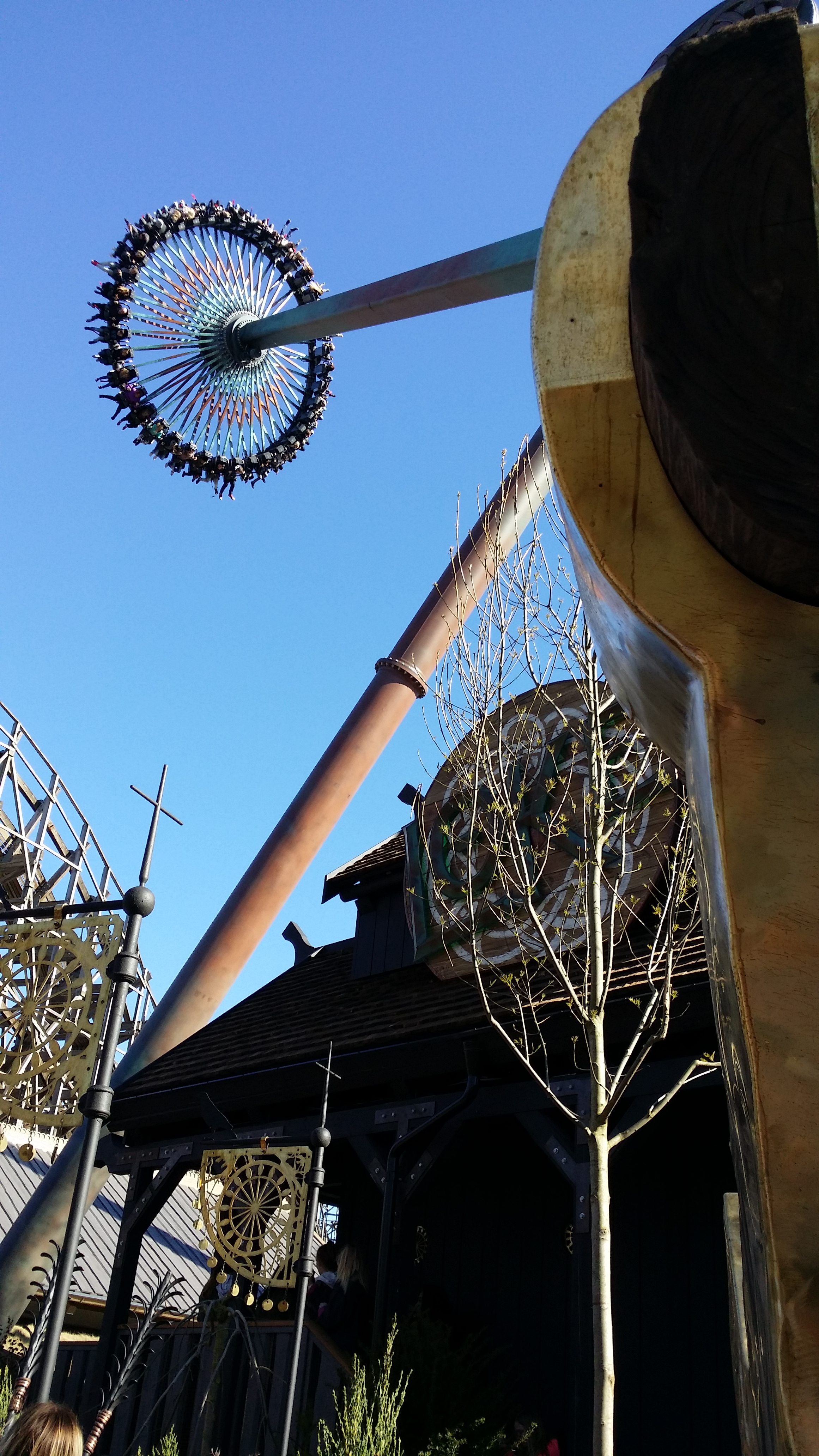 Loke på Liseberg, dagen efter premiären.